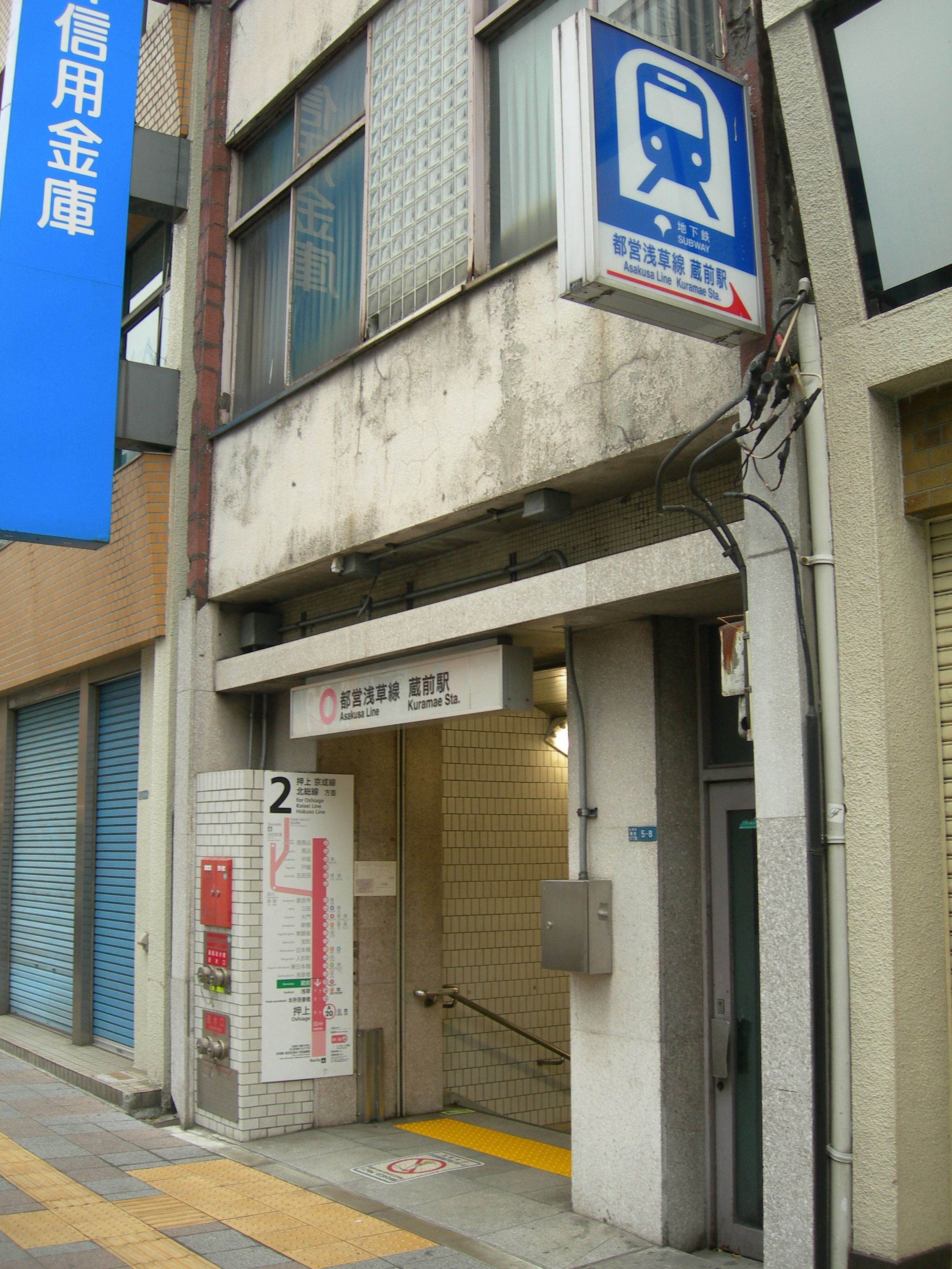 都営地下鉄浅草線・蔵前駅